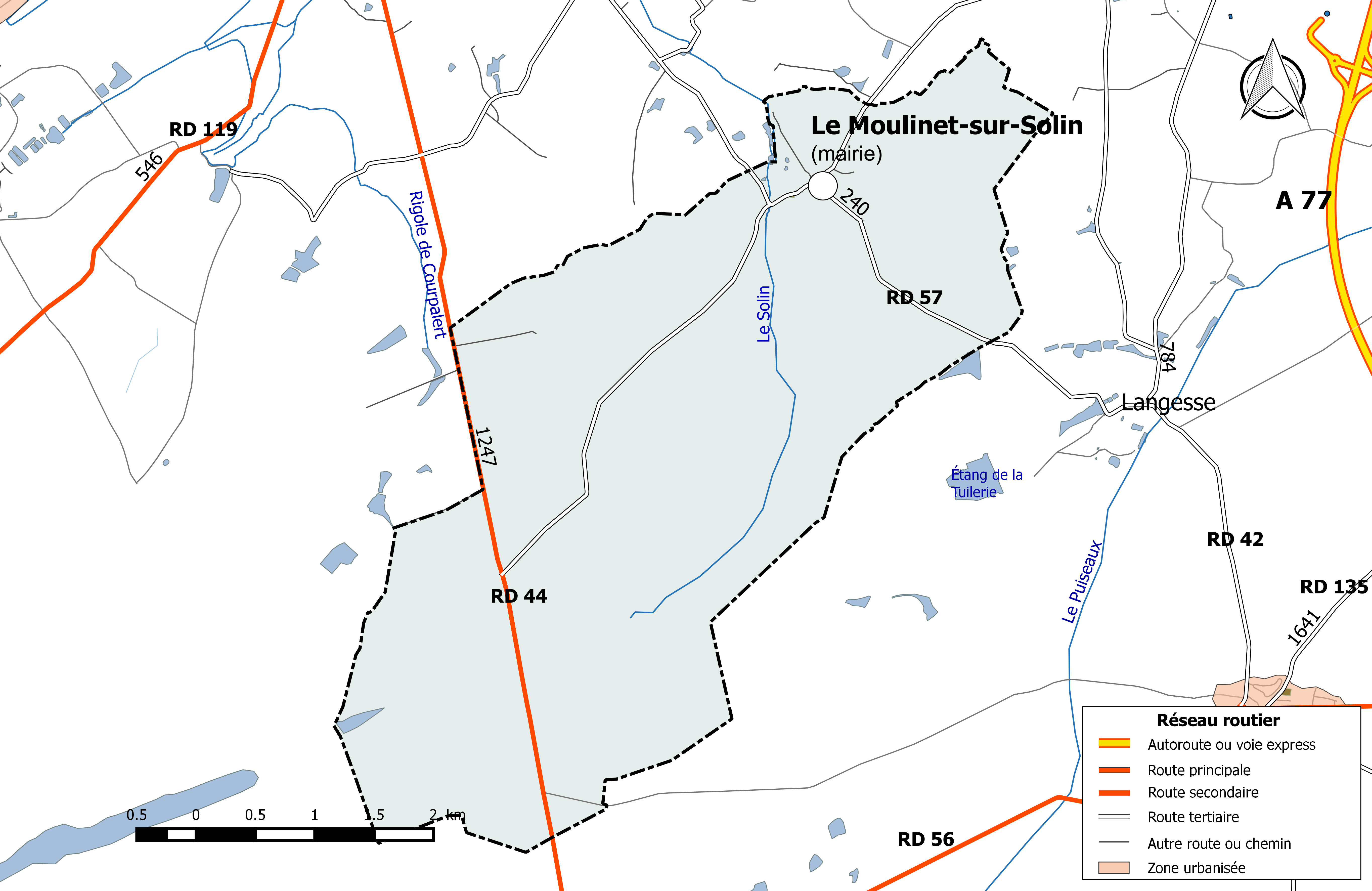 Carte du réseau routier de la commune de Le Moulinet-sur-Solin.